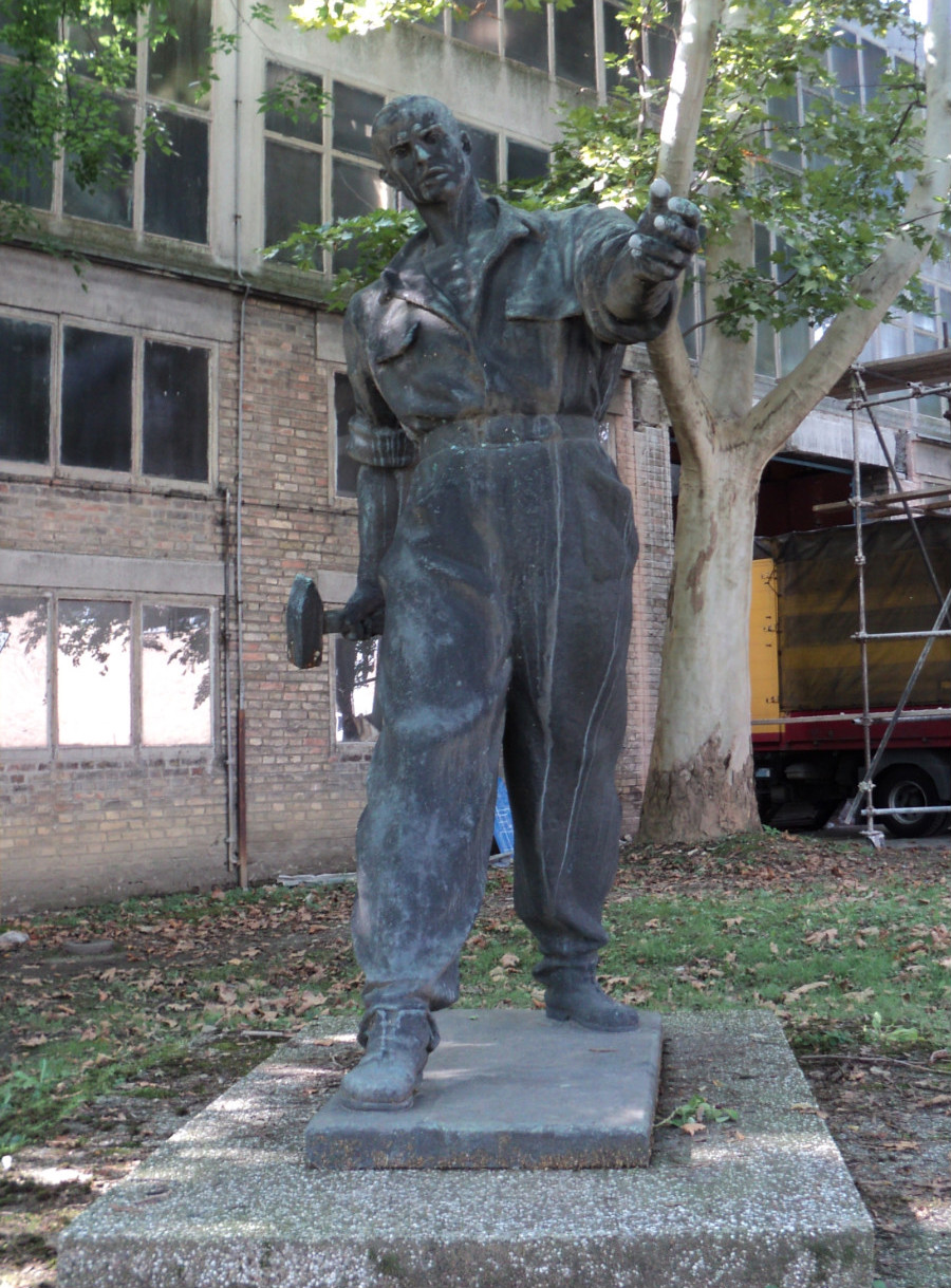 Фотографисано 14. септембра 2010. године у Загребу. Аутор: Пламен